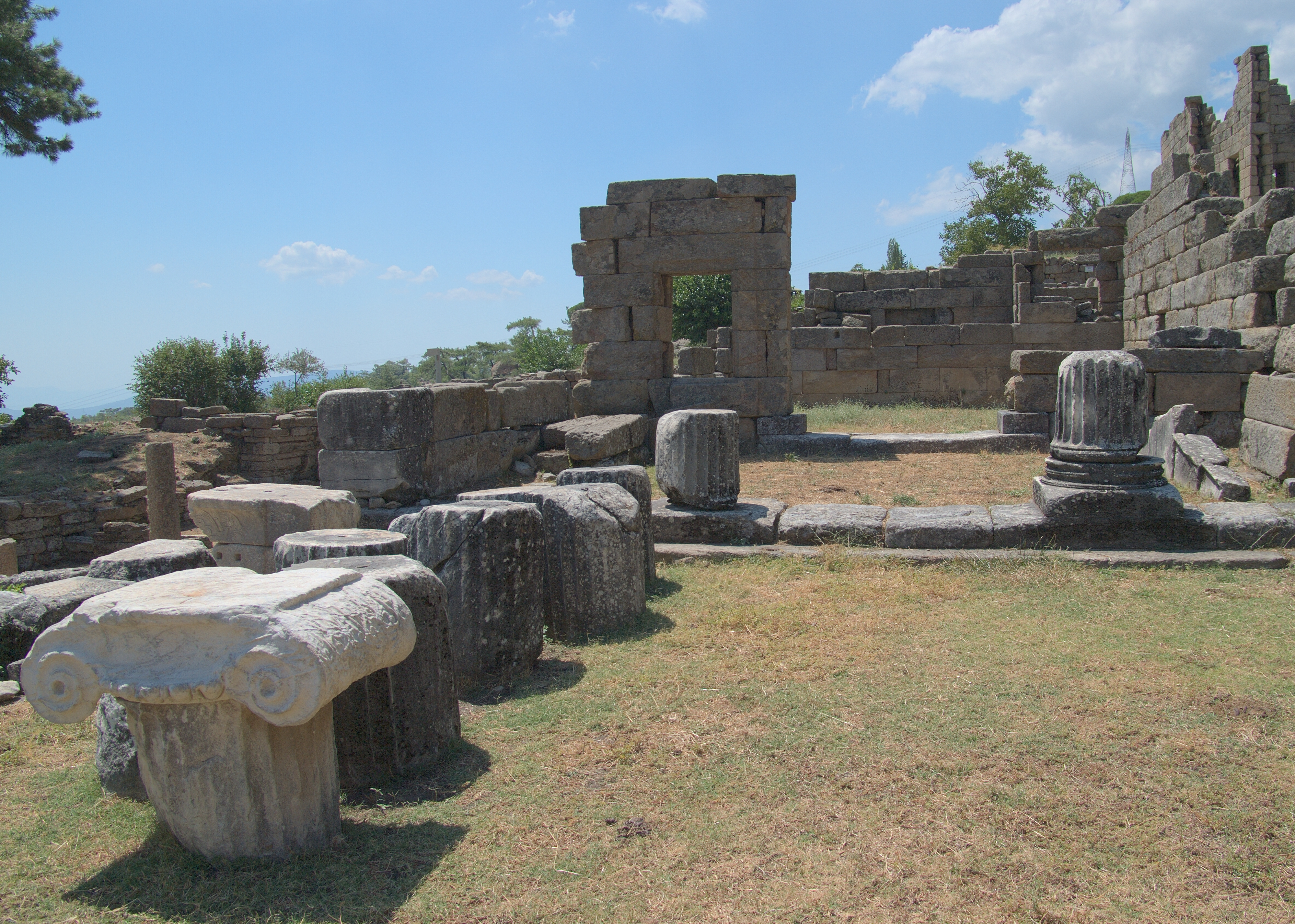 Лабранда. Андрон Б